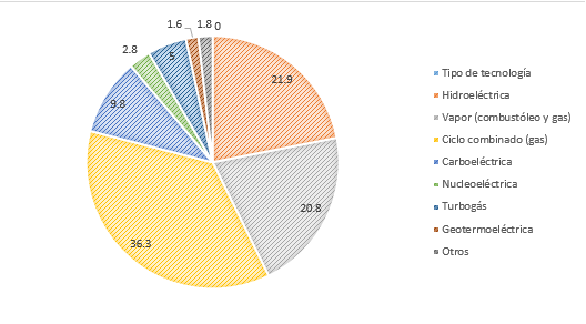 Porcentaje de capacidad de generación de energía por tipo de tecnología. Total: 41,899.4(MW)